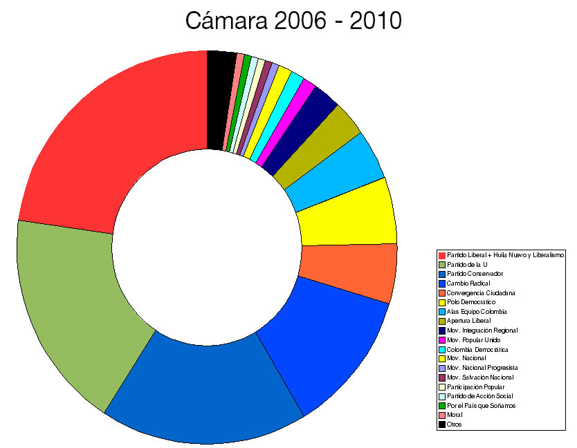 Conformación de la Cámara de Representantes por partidos.